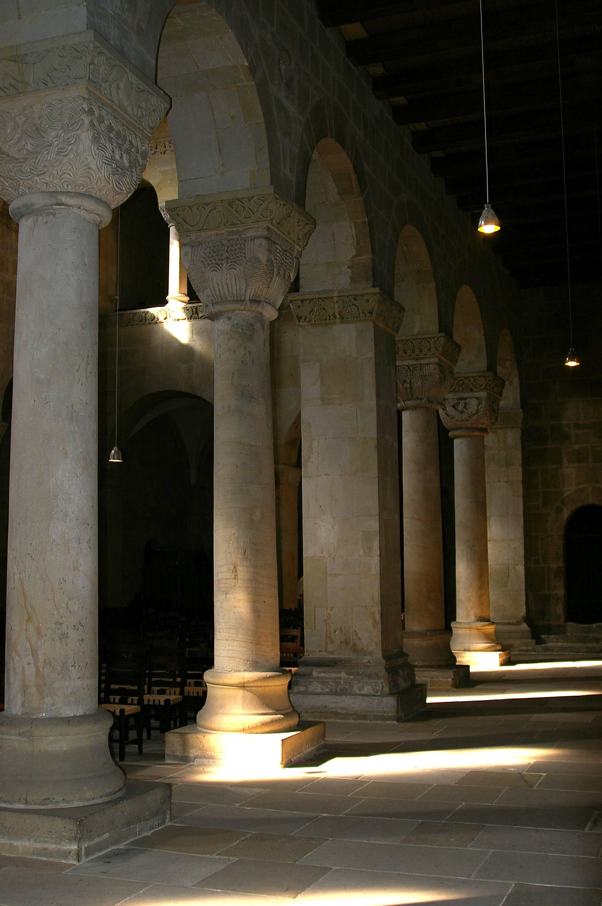 Quedlinbug - Stiftskirche-Innen - romanische Säulen und Kapitelle